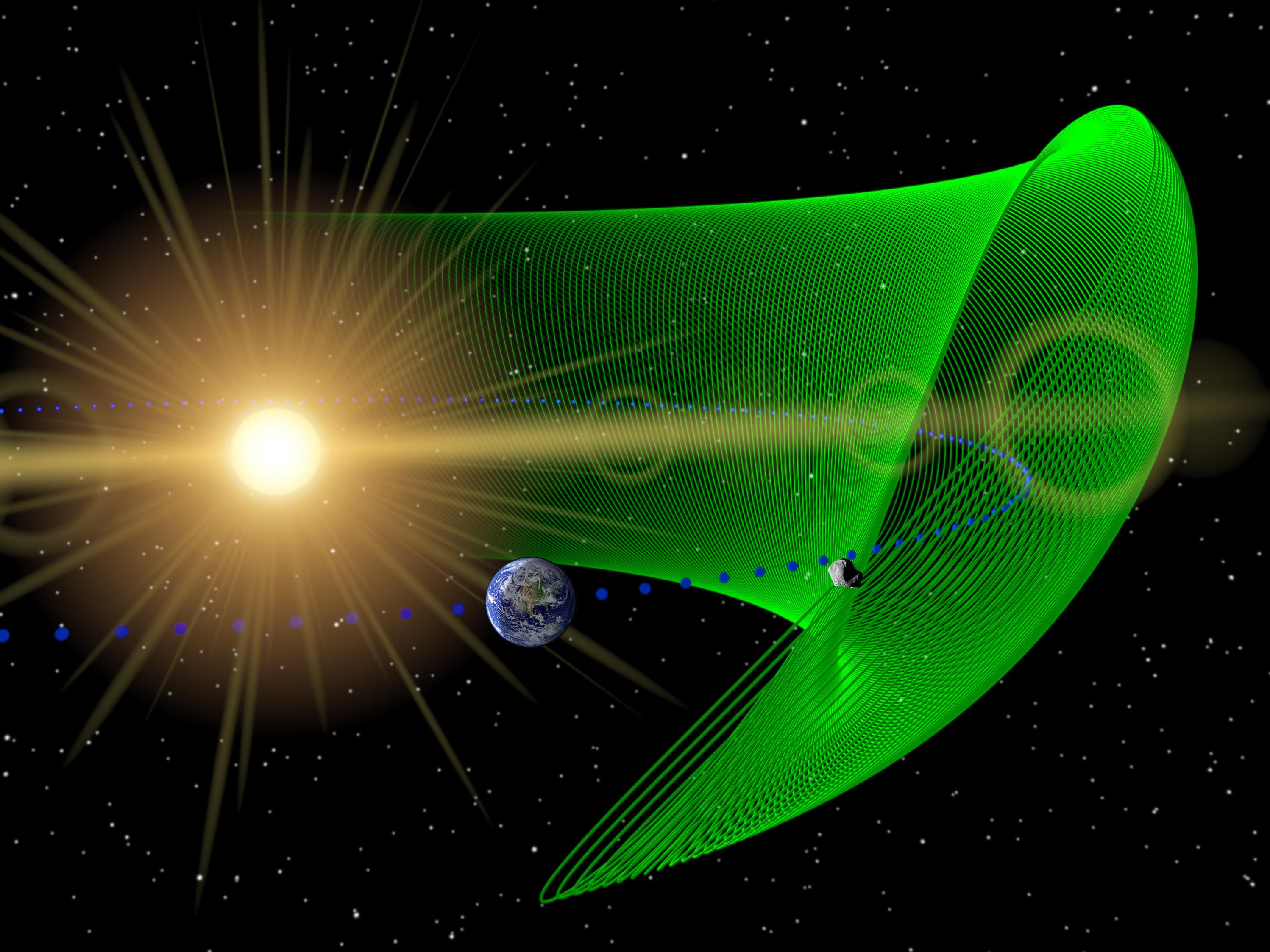 Oběžná dráha planetky 2010 TK7